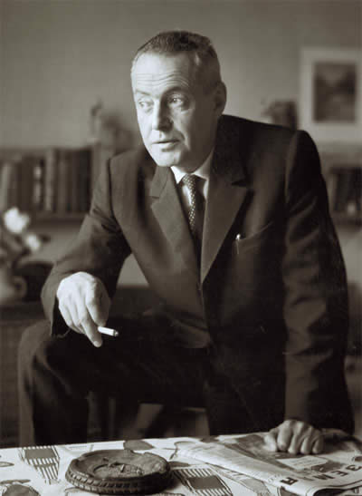 Советский и русский художник Бирштейн Макс Авадьевич